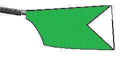 Colores oficiales en remos del Lakeside Club de Remo AC México